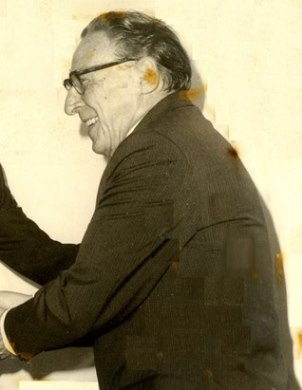 Distincion 1